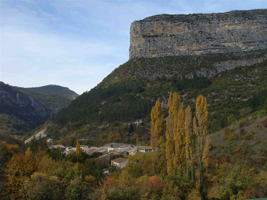 Rémuzat en Drôme provençale